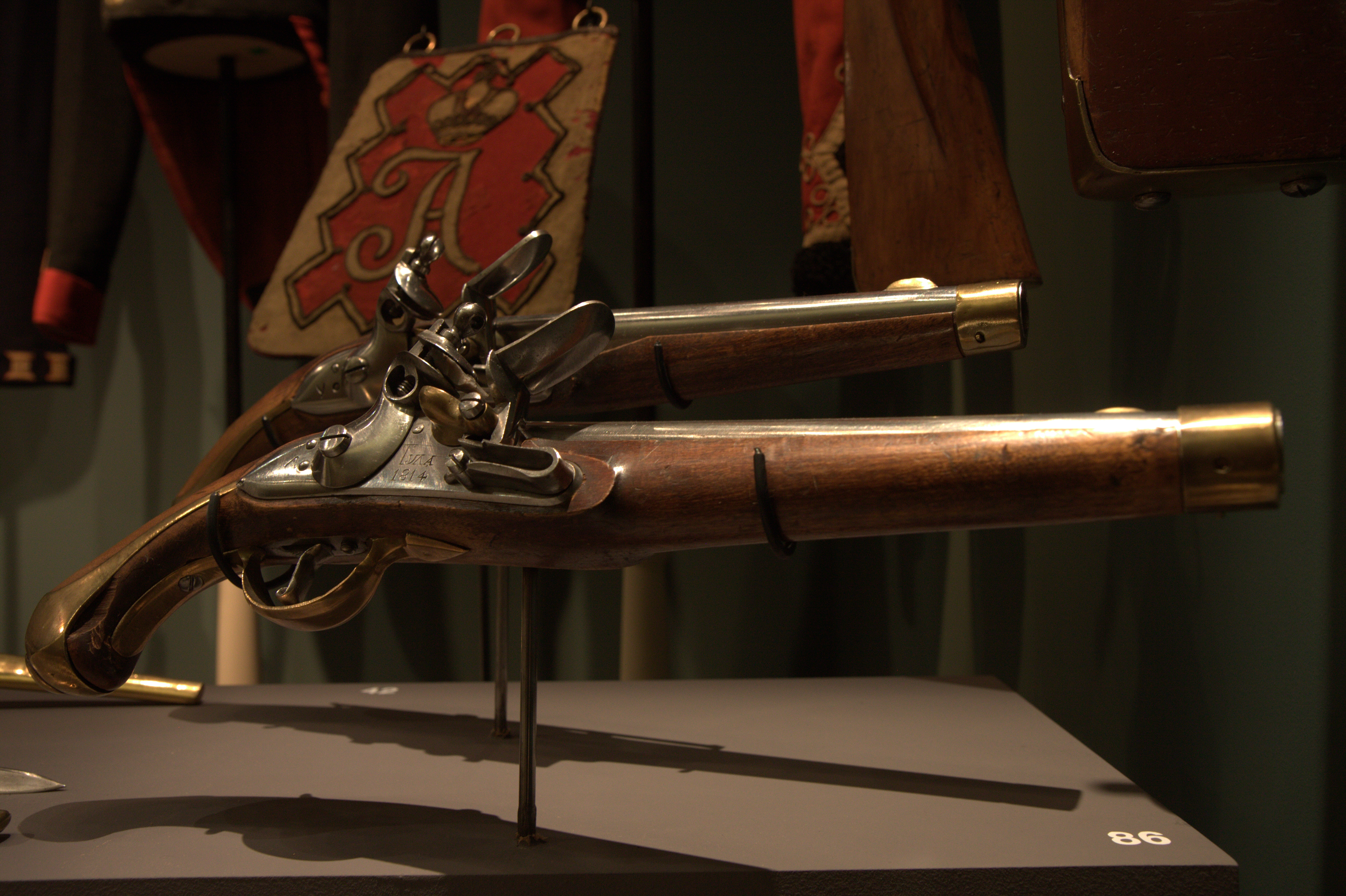 Pistolets de cavalerie modèle 1809.